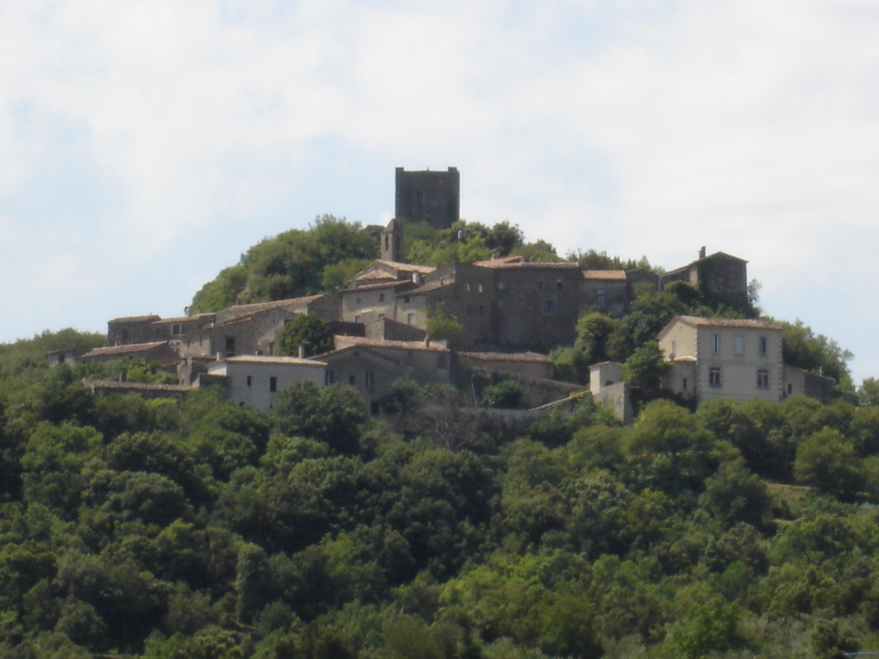 Pégairolles-de-Buèges (34, Hérault, France)